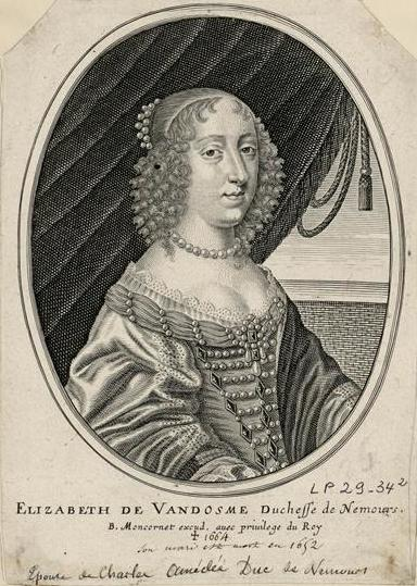 Élisabeth de Bourbon (1614-1664), duchesse de Nemours